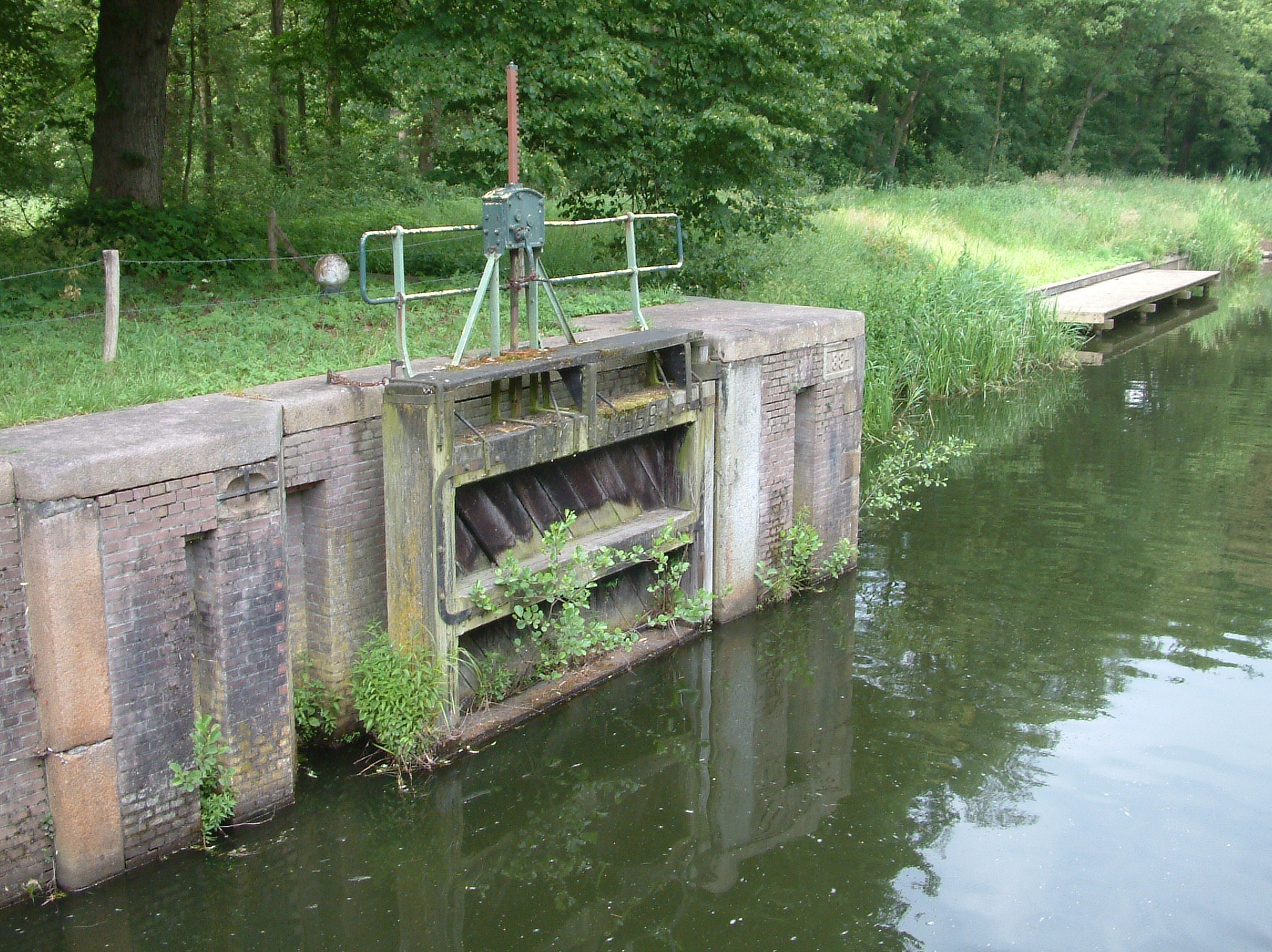 Sluis in het Apeldoorns kanaal van Dieren naar Hattem